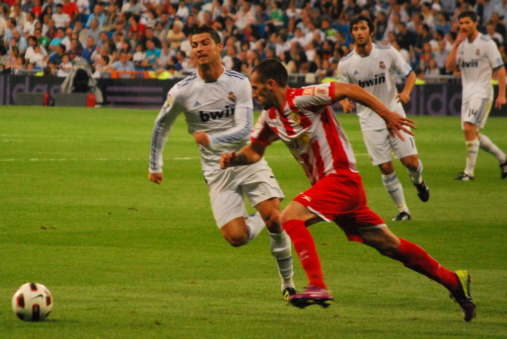 Cristiano Ronaldo et Antonio Luna Rodríguez lors d'un match entre le Real Madrid et l'UD Almería.